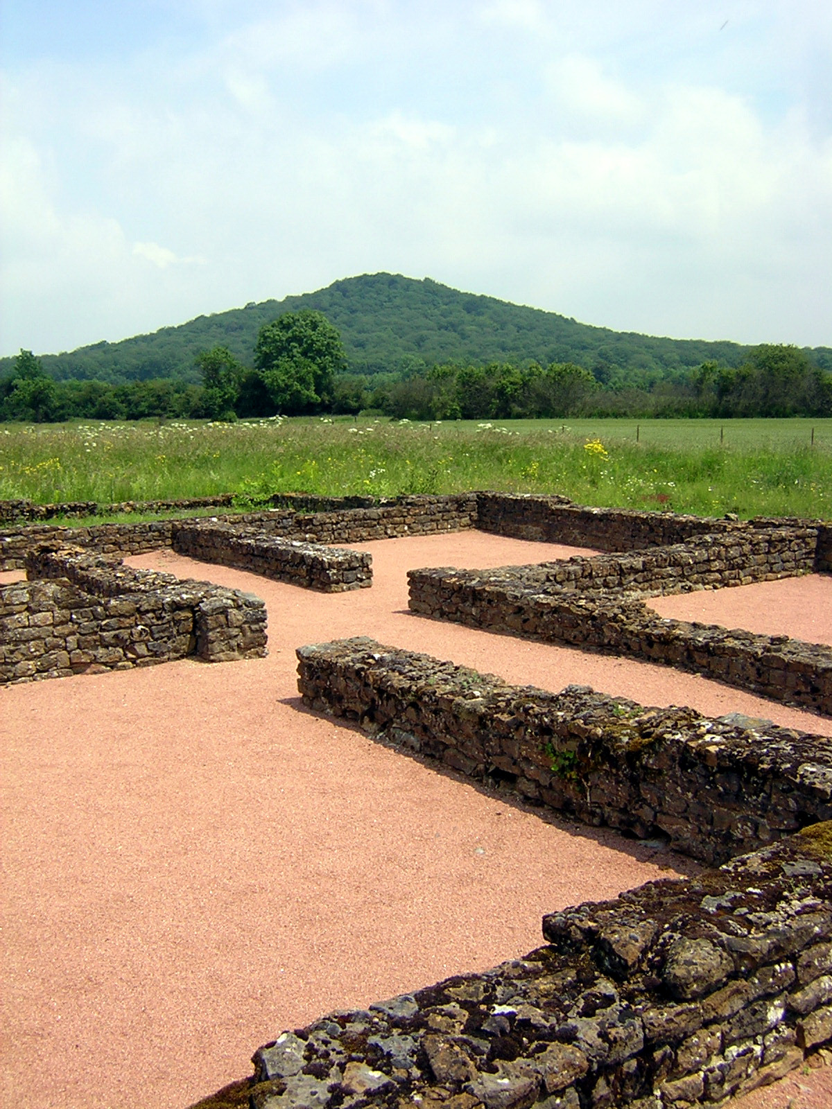 Vestiges de la villa d'Andilly-en-Bassigny. A l'arrière-plan, le mont Mercure